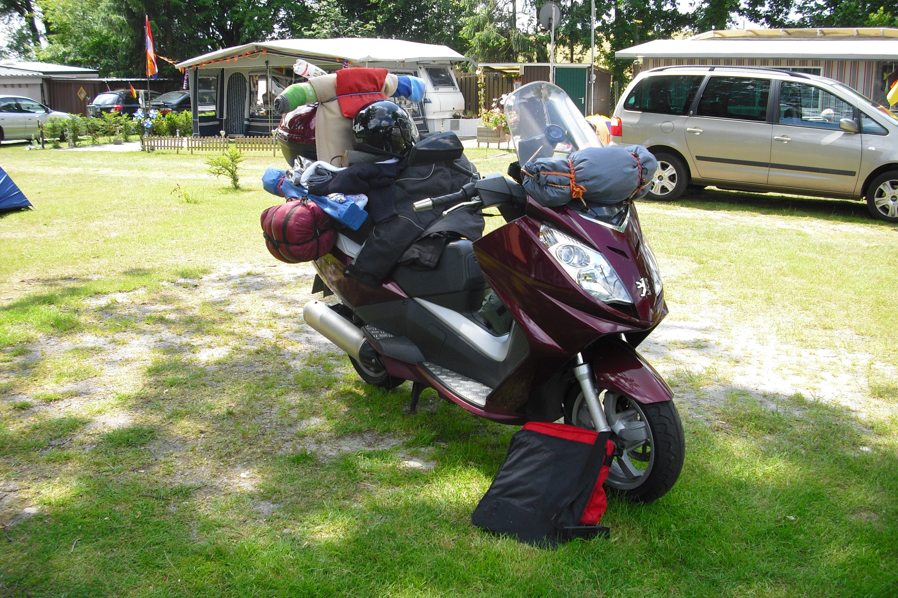 Roller Peugeot Satelis (125) im Urlaubseinsatz